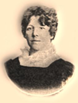 Ilse Frapan, eigentlich Elise Therese Ilse Levien (ab 1901 auch Pseudonym Ilse Akunian) (* 3. Februar 1849 in Hamburg; † 2. Dezember 1908 in Genf)